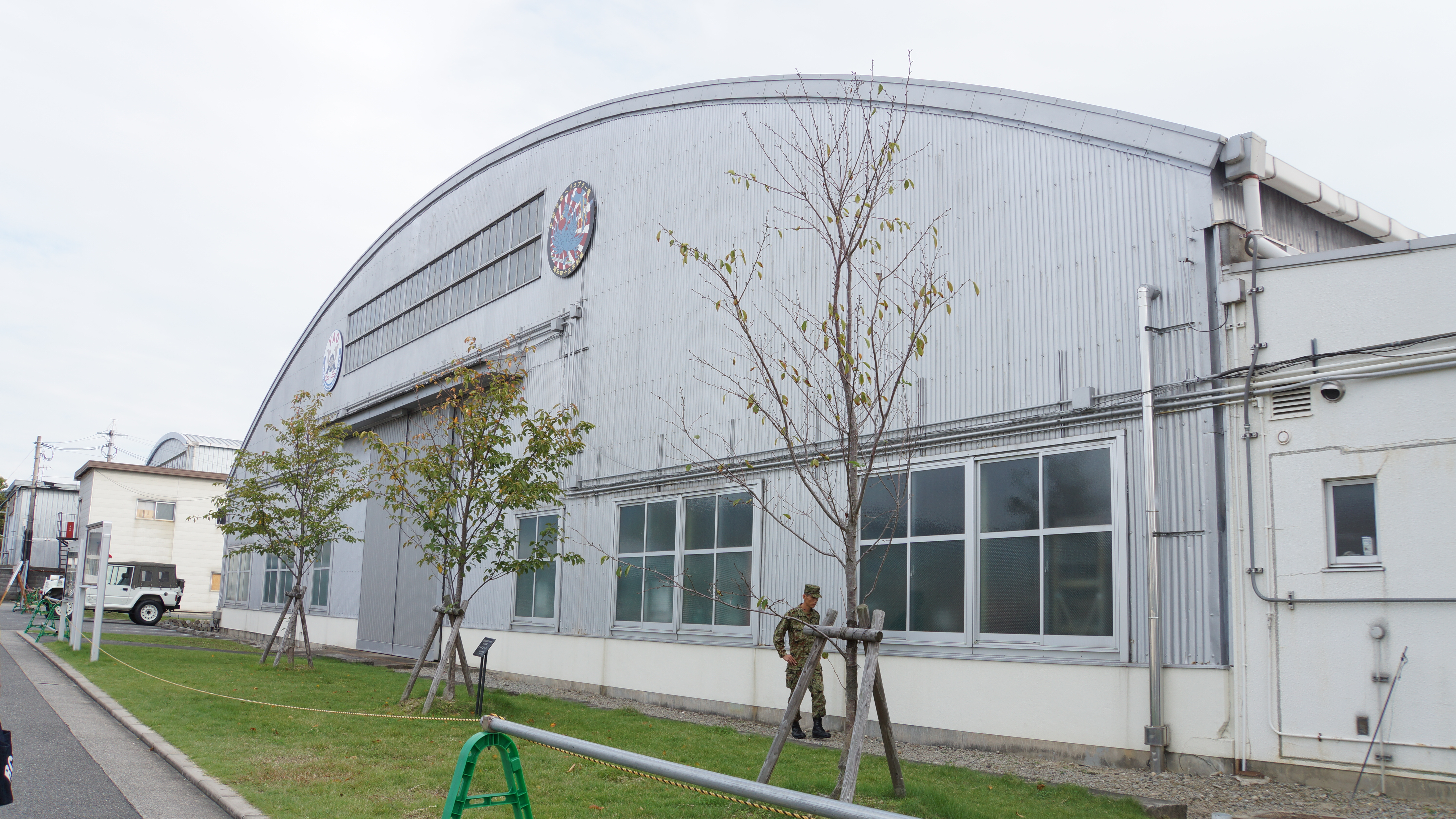 陸上自衛隊 八尾駐屯地 第5格納庫。2016年10月16日撮影。